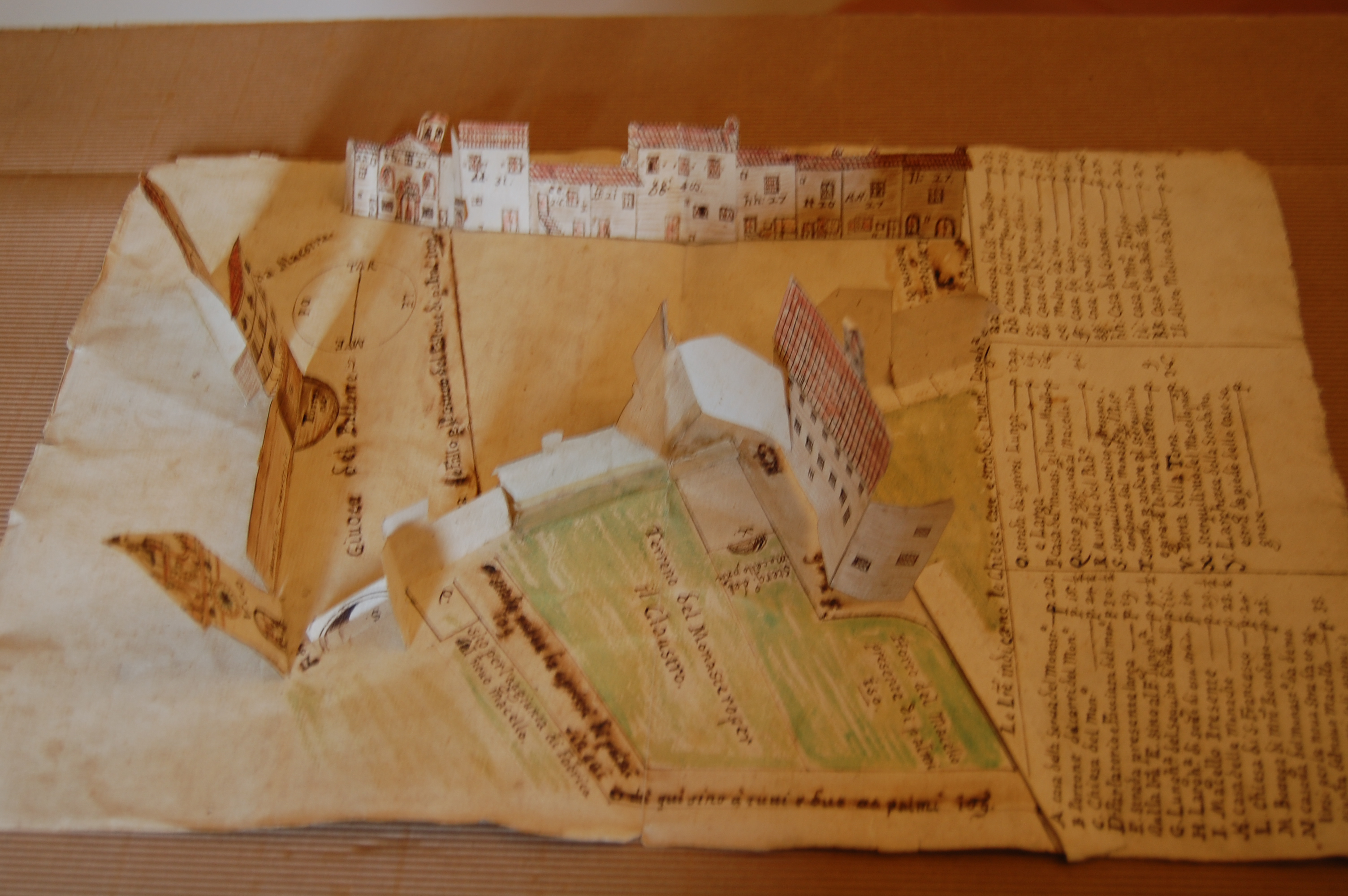 Montecarotto, piazza della vittoria in una vecchia mappa del 700.